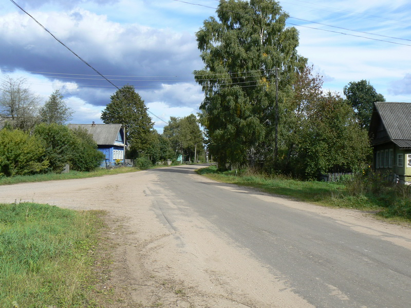 Орешки